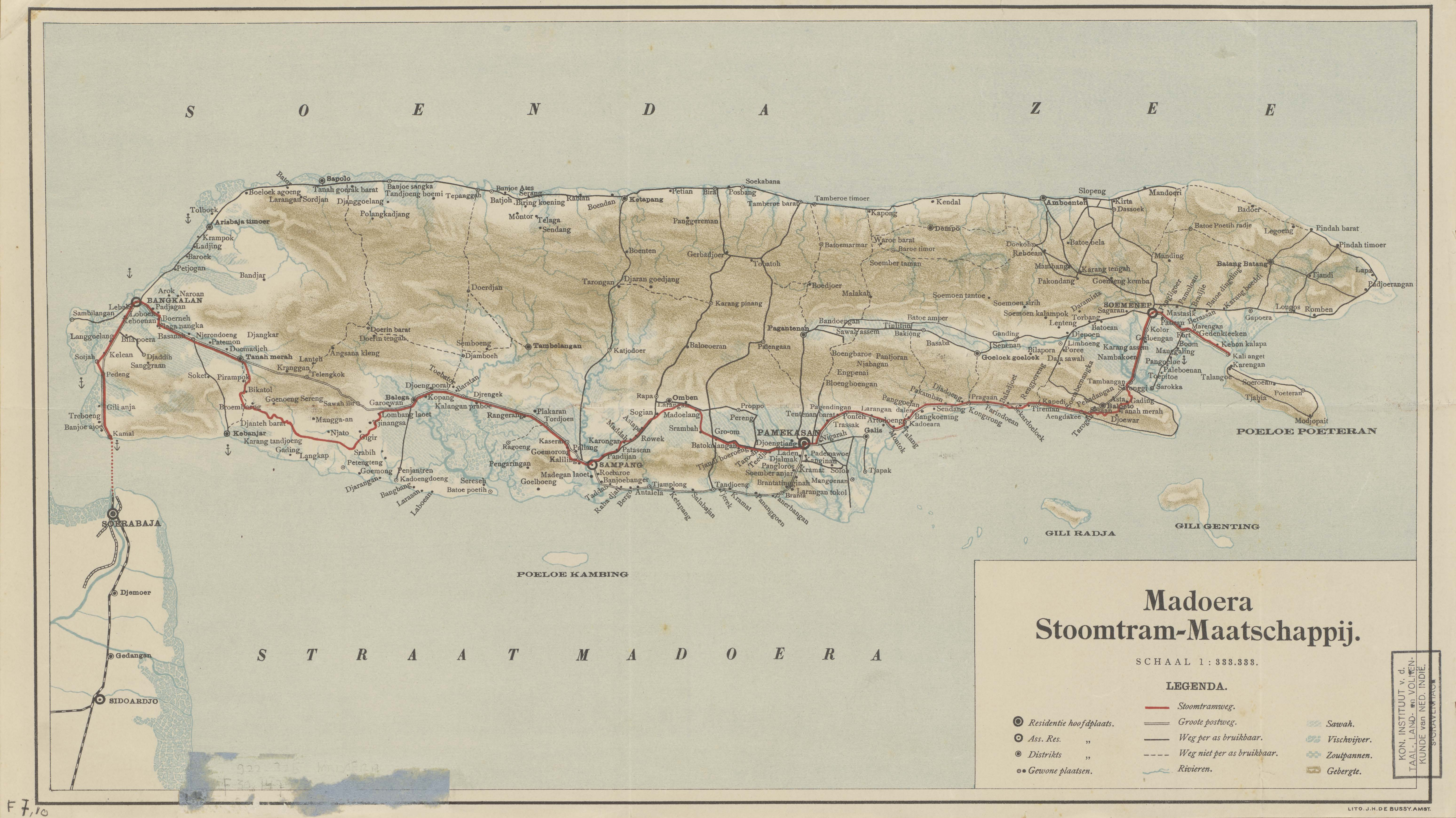 Peta jaringan rel Madoera Stoomtram Maatschappij